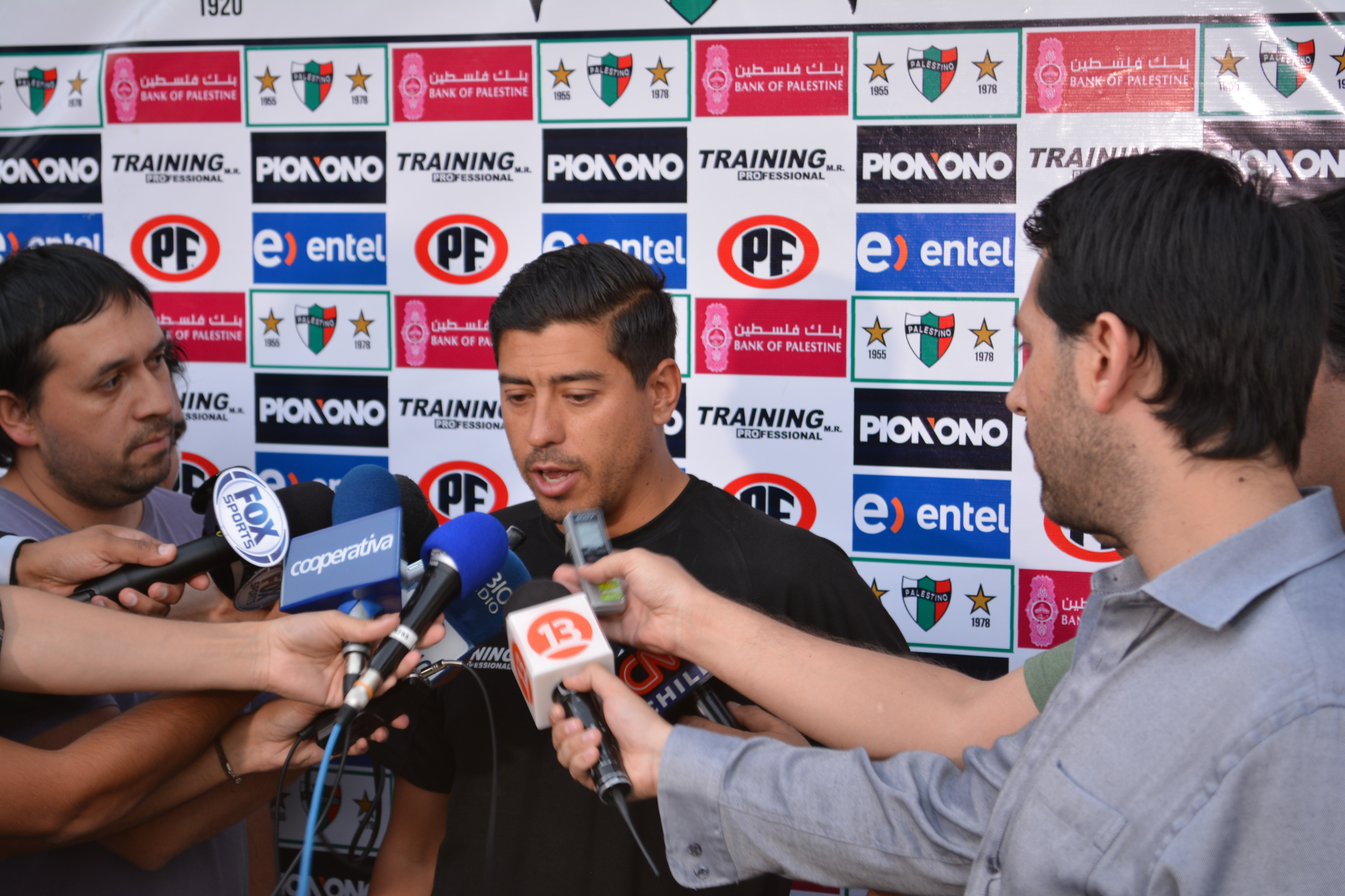 Palestino - Iquique, 26-02-2016, Estadio Municipal de La Cisterna, Santiago, Chile